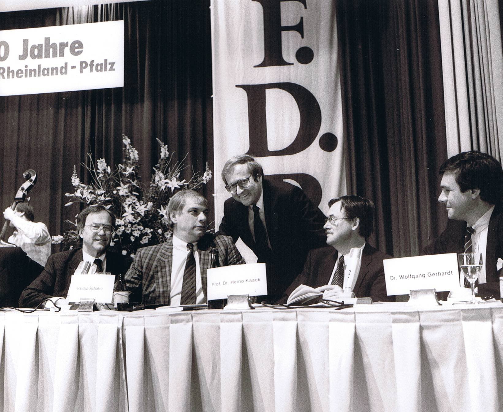 Landesparteitag 1987 in Bad Kreuznach, Festakt 40 Jahre FDP Rheinland-Pfalz